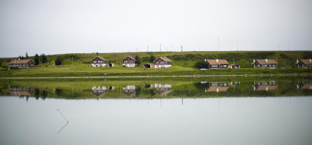 Ushuaia - El Fin del Mundo